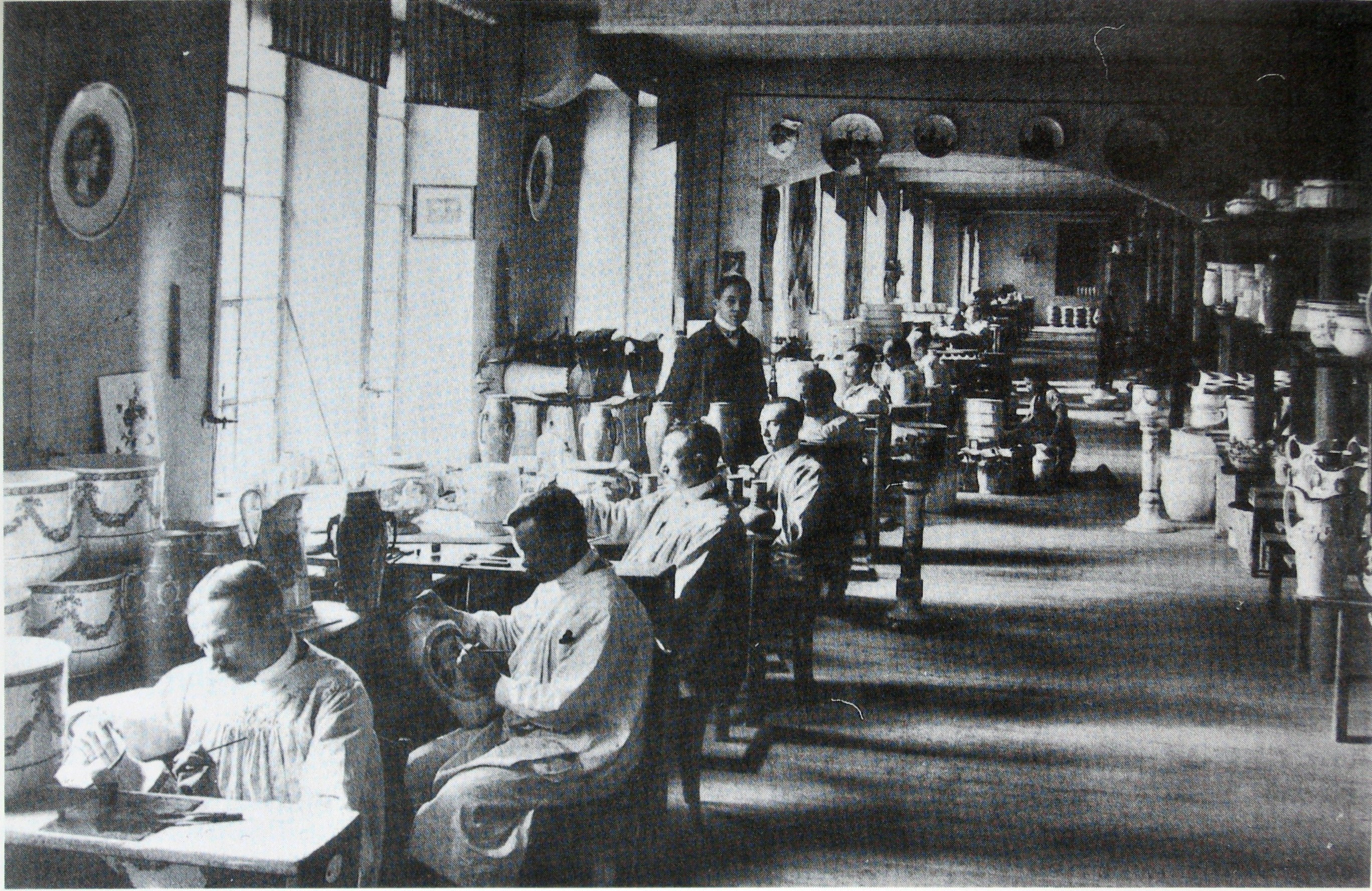 Keramikmaler Villeroy & Boch in Mettlach 1893